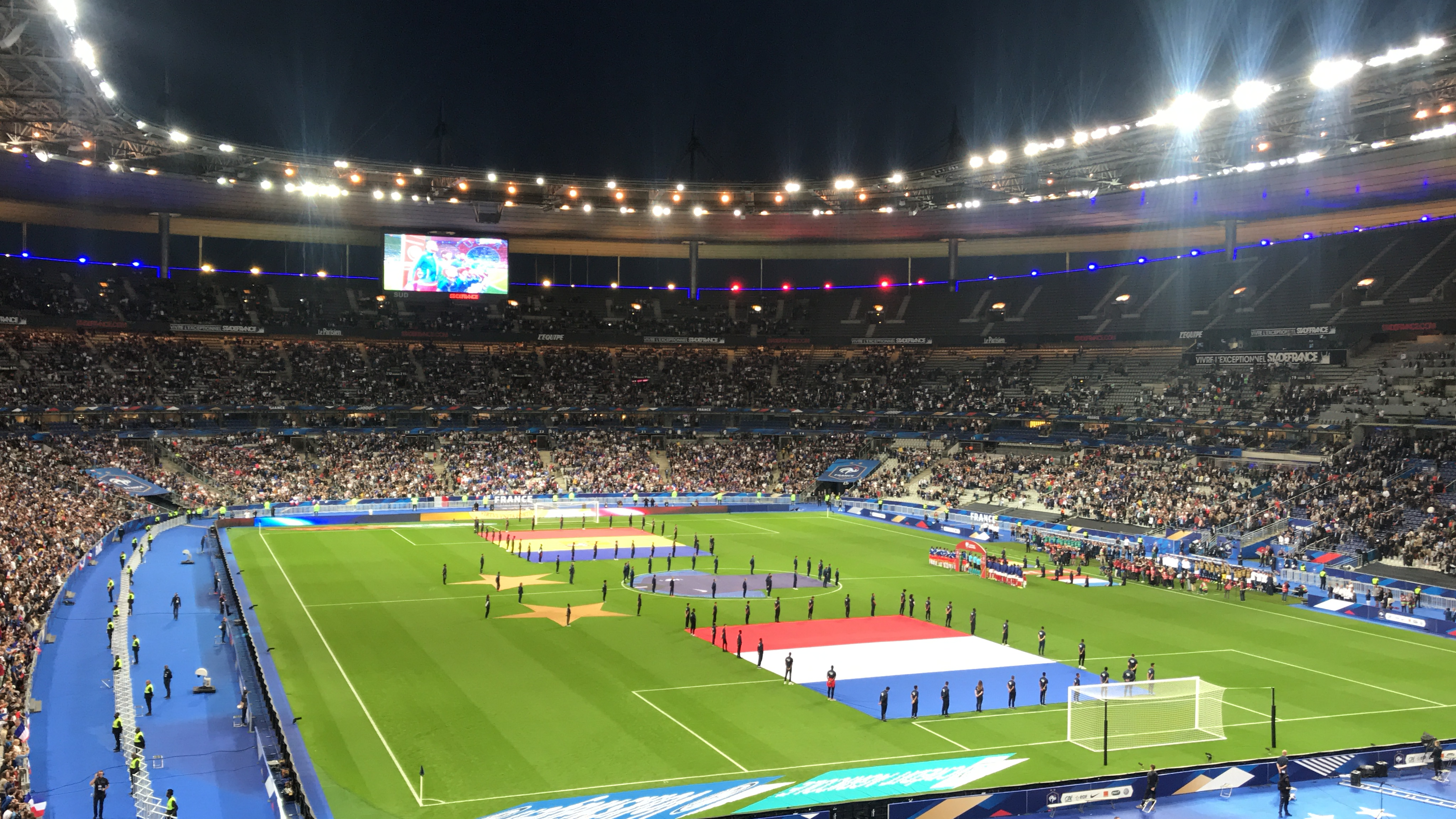 France-Andorre Stade de France Qualifications Euro 2020